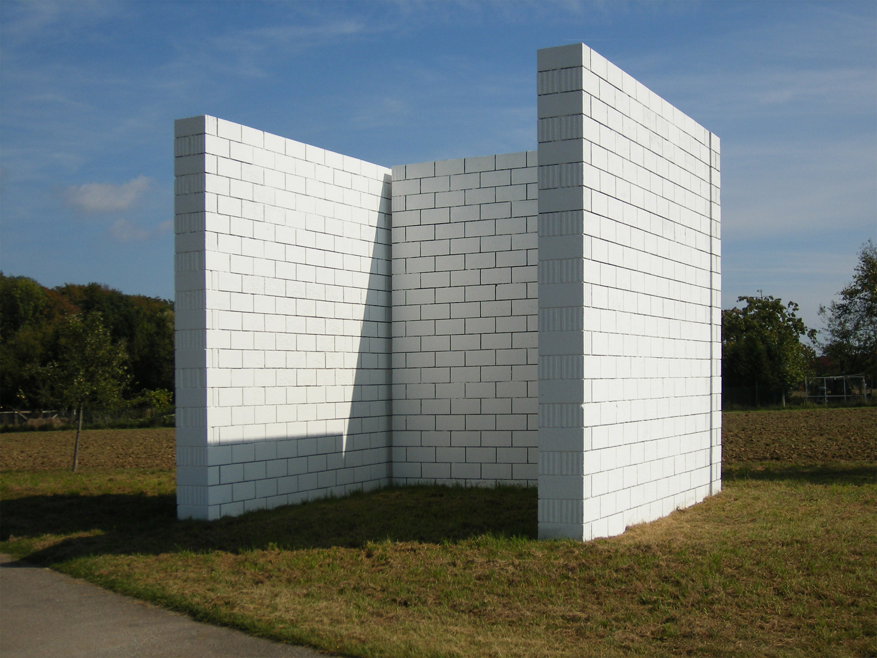 Gruppierung von drei Backsteinmauern des amerikanischen Künstlers Sol LeWitt, errichtet 1992 am Ortsausgang von Ostfildern-Ruit in Richtung Stuttgart-Heumaden.